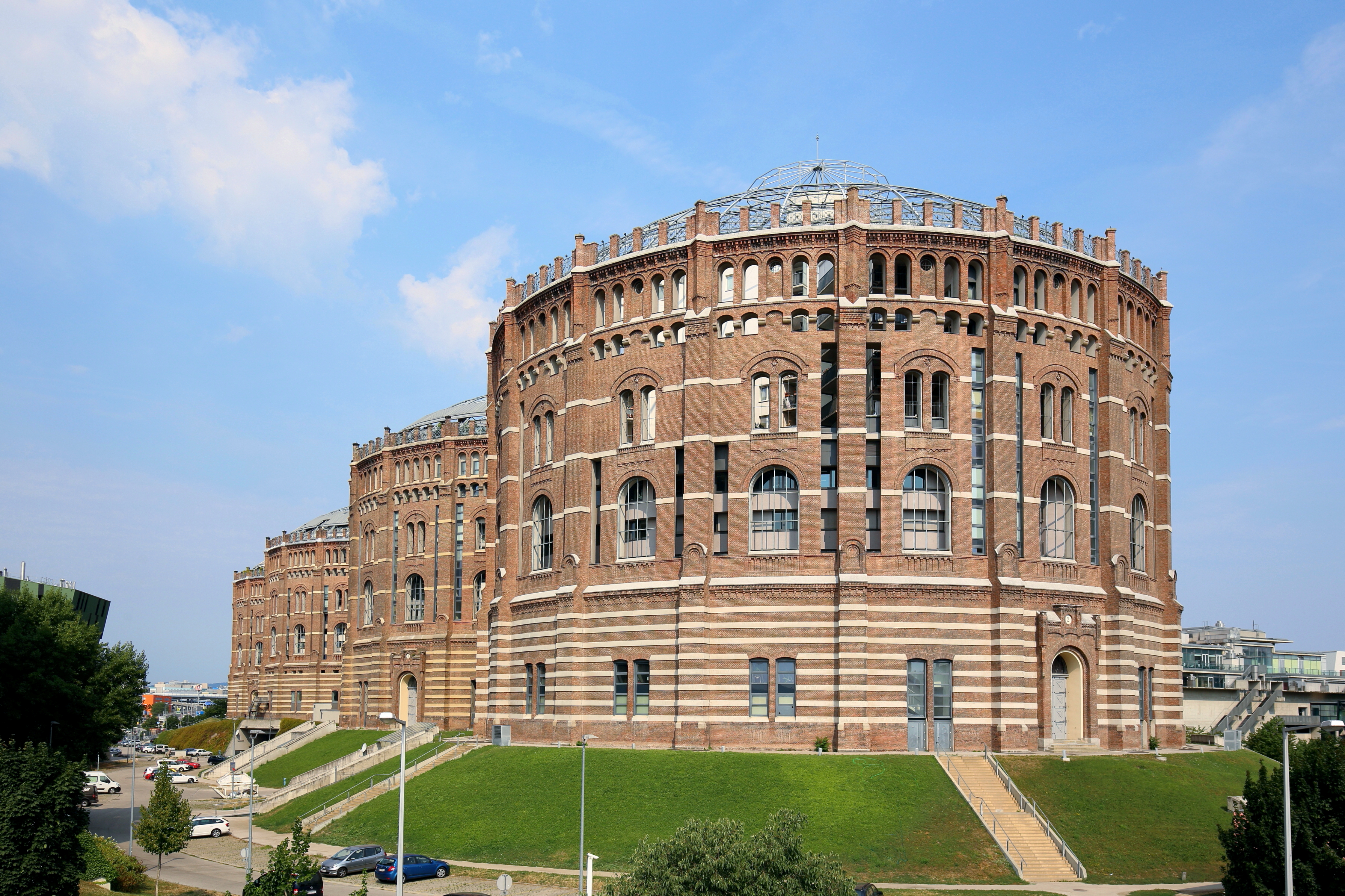 Südostansicht der 4 Gasometer im 11. Wiener Gemeindebezirk Simmering.Die 4 Gasometer mit jeweils einem Innendurchmesser von rund 63 Meter, einer Höhe von 75 Meter und einem Fassungsvolumen von 90.000 m³ Gas wurden von 1896 bis 1899 im Zuge der Errichtung des städtischen Gaswerkes Simmering gebaut. Um 1980 wurden sie als späthistoristische Industriedenkmale unter Denkmalschutz gestellt und Mitte der 1980er Jahre stillgelegt. Von 1999 bis 2001 erfolgte ein Umbau zu einem Wohn-, Geschäfts- und Einkaufszentrum, wobei nur die äußeren Sichtziegelmauerwerke mit den Dächern erhalten blieben.